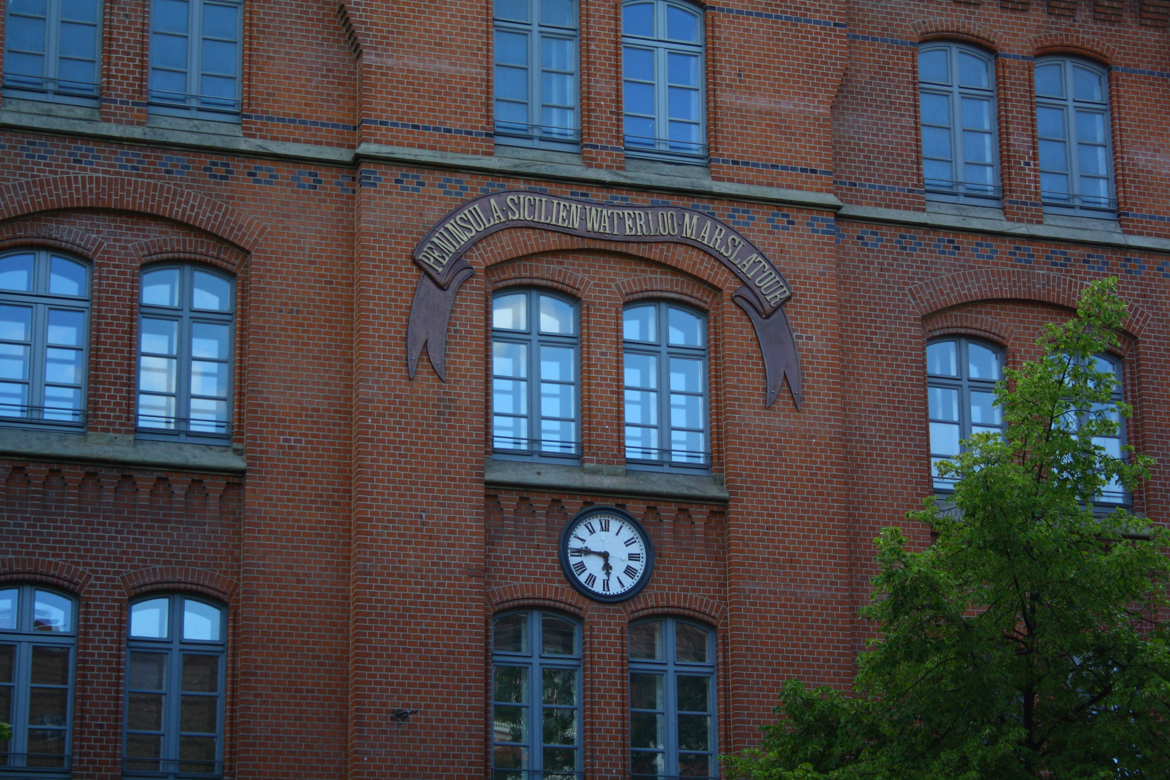 Fassade der Mars-La-Tour Kaserne in Braunschweig